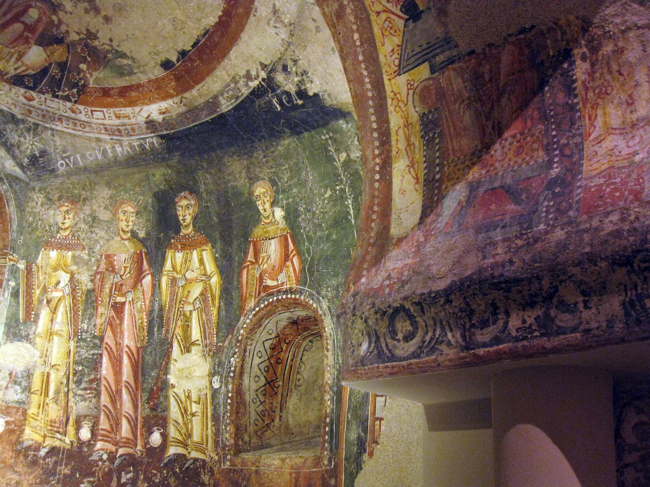 Palau Nacional (Barcelona)